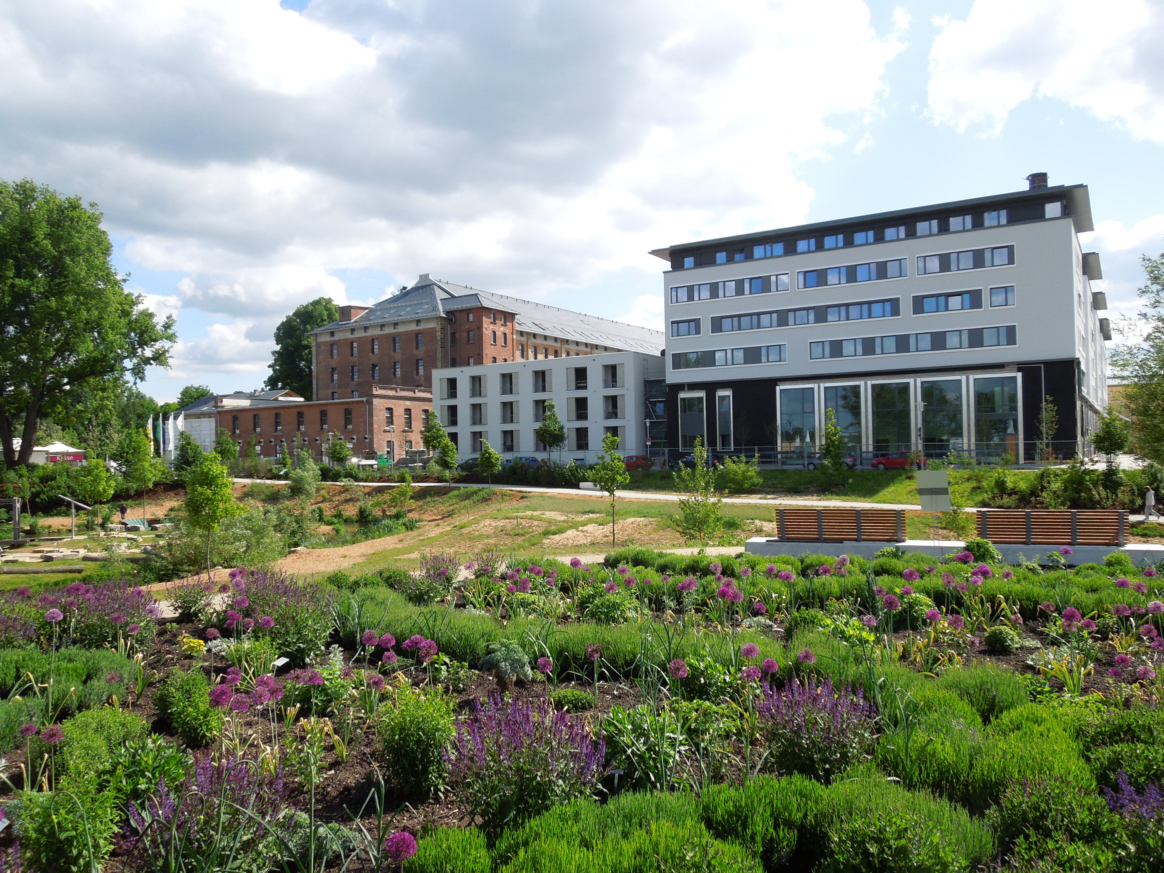 Die Fakultät Wirtschaftsinformatik und Angewandte Informatik befindet sich auf der ERBA-Insel im Bamberger Norden